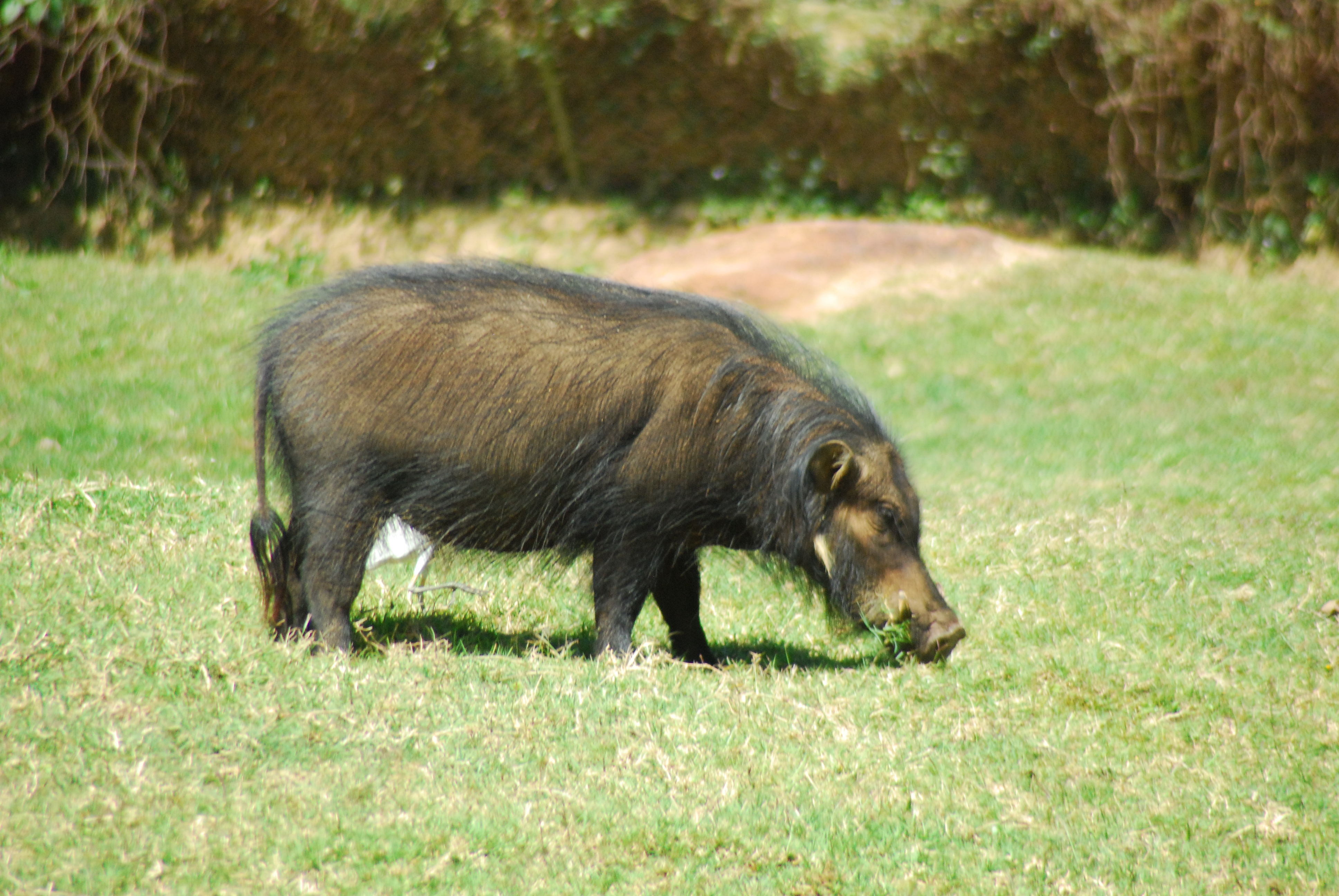 Un Hylochère (Hylochoerus meinertzhageni) dans le zoo de Entebbe, Ouganda. Diné bizaad: Tsintah bisóoditsoh.